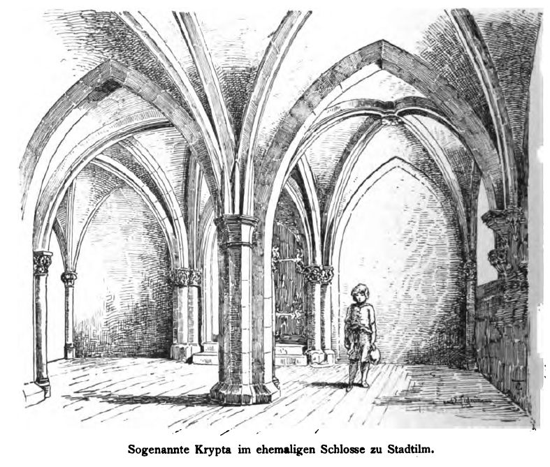 Die sogenannte Krypta im Schlosse zu Stadtilm.